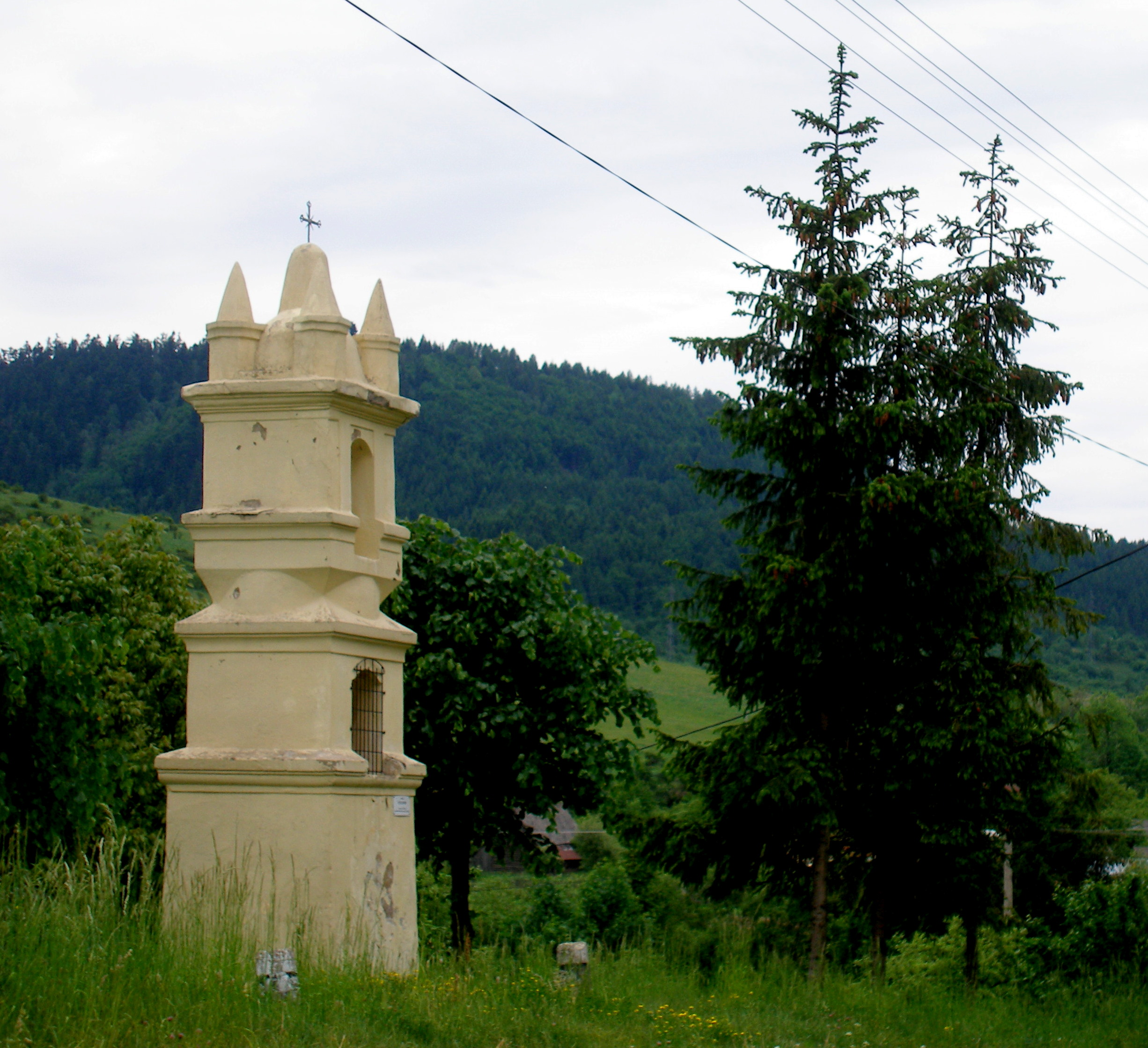 Obec Nižný Slavkov okres Sabinov.